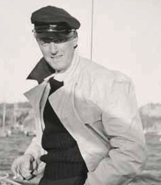 Arkitekt Ernst Grönvall på 1950-talet